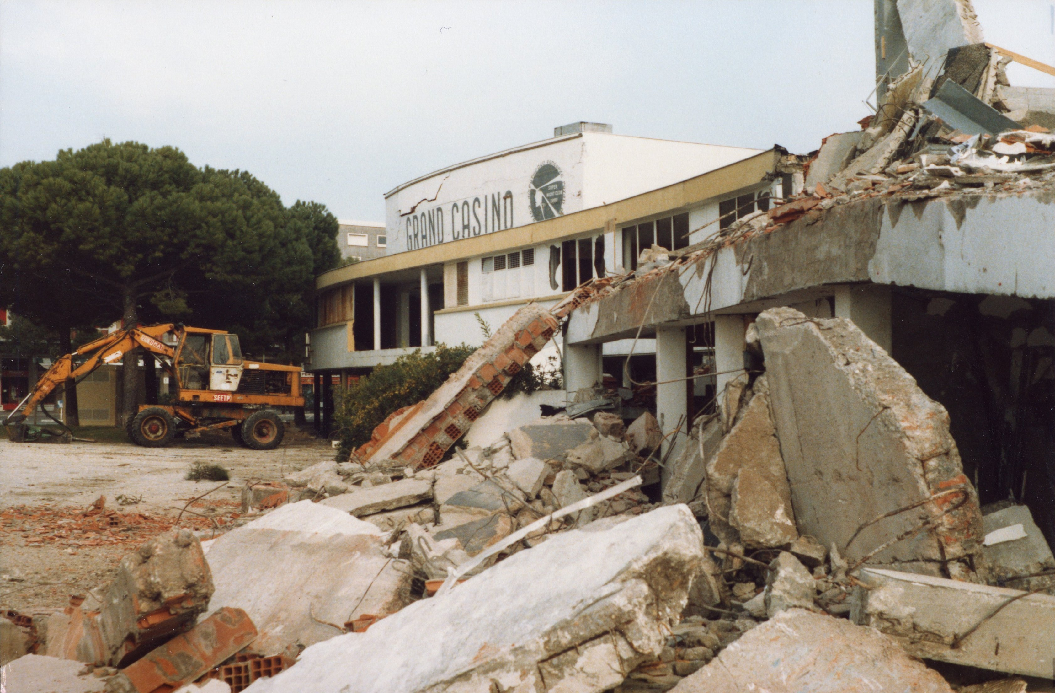 Le casino de Claude Ferret à Royan, au moment de sa destruction.